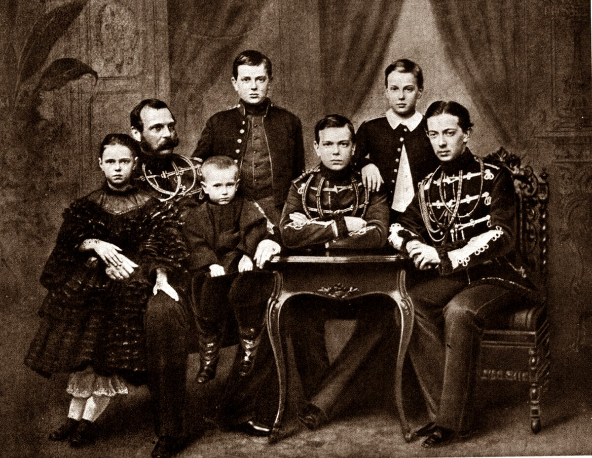 Император Александр II с детьми (фото 1860 г.)